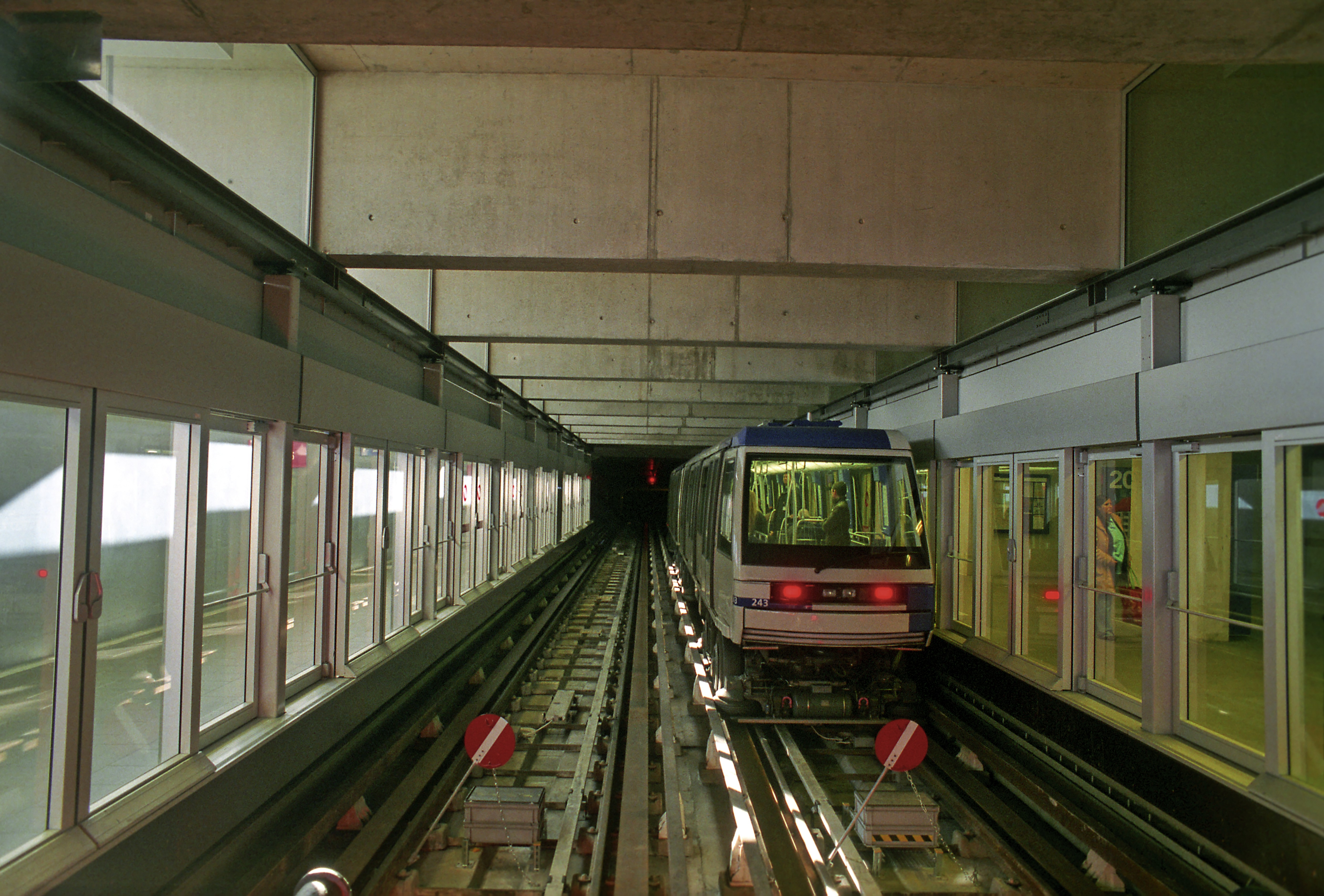 Linie m2 der Metro Lausanne, wegen des automatischen Betriebes sind die Bahnsteige durch Türen von den Gleisen getrennt. Diese Sicht gibt es nur an den Endpunkten.